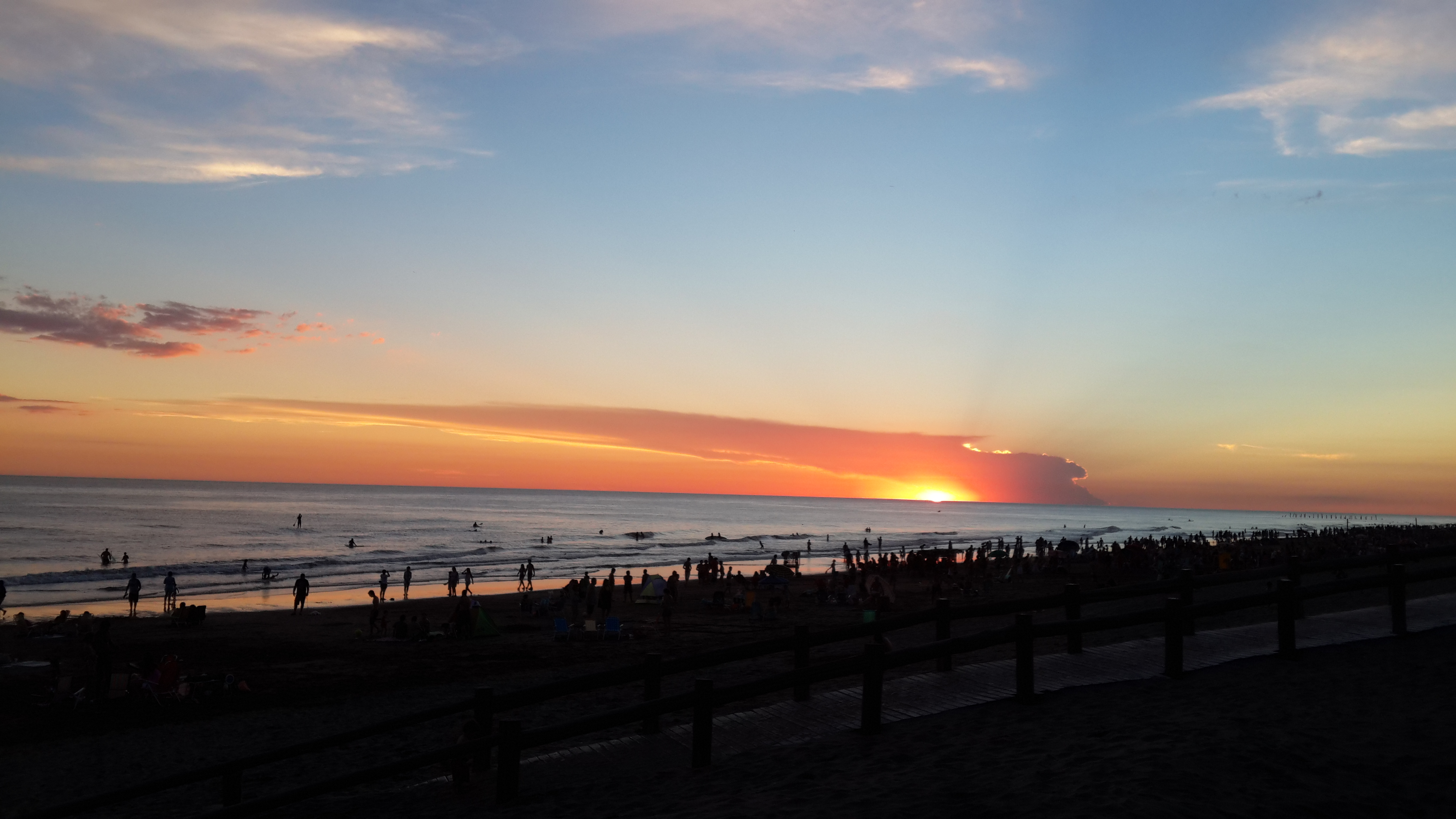 Atardecer en la playa en la Ciudad de Monte Hermoso.